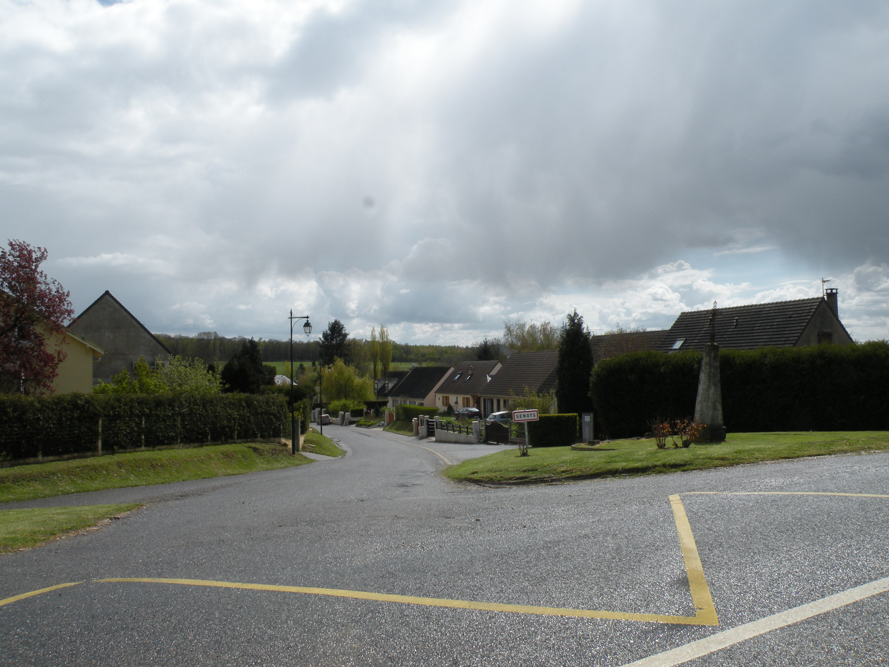 entrée du village de Senots